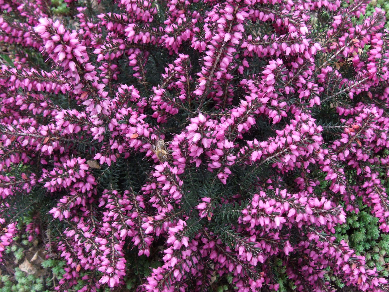 Erica × darleyensis 'Kramer`s Rote' (cultyvare)